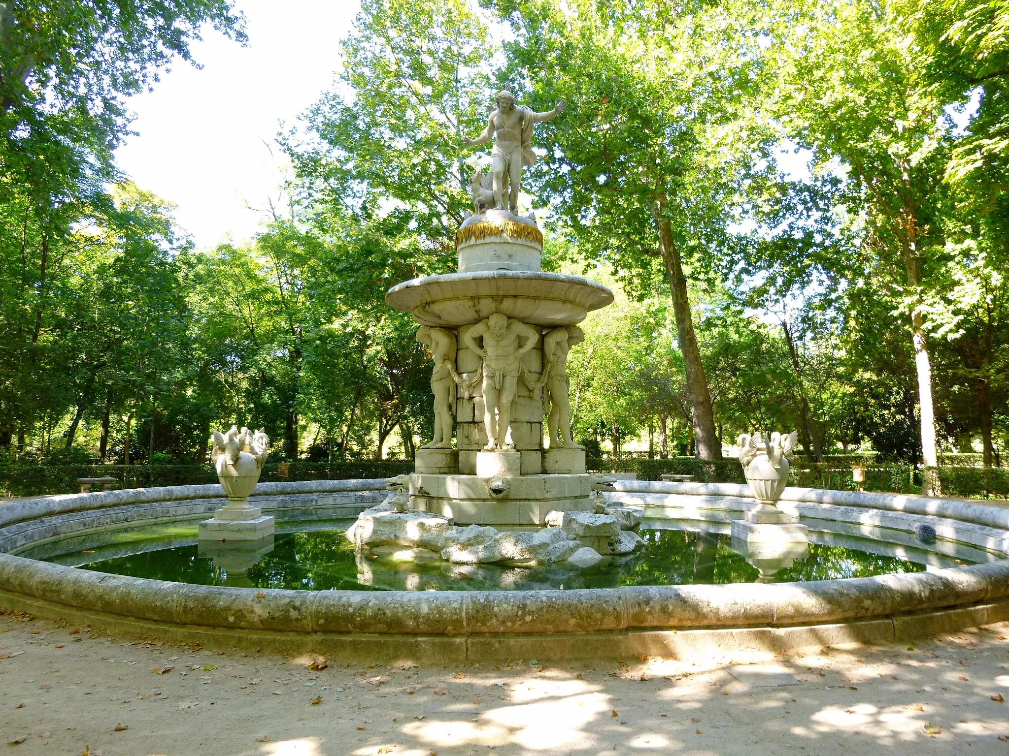 Fuente de Narciso, Jardín del Príncipe, Real Sitio de Aranjuez